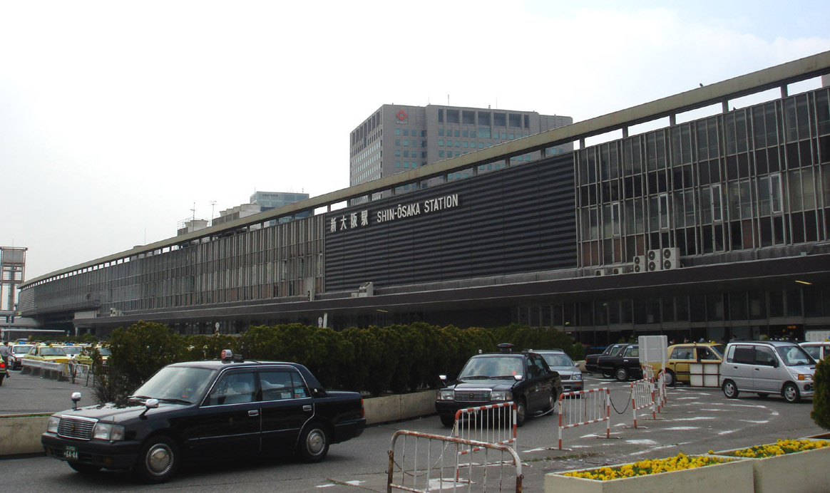 新大阪車站